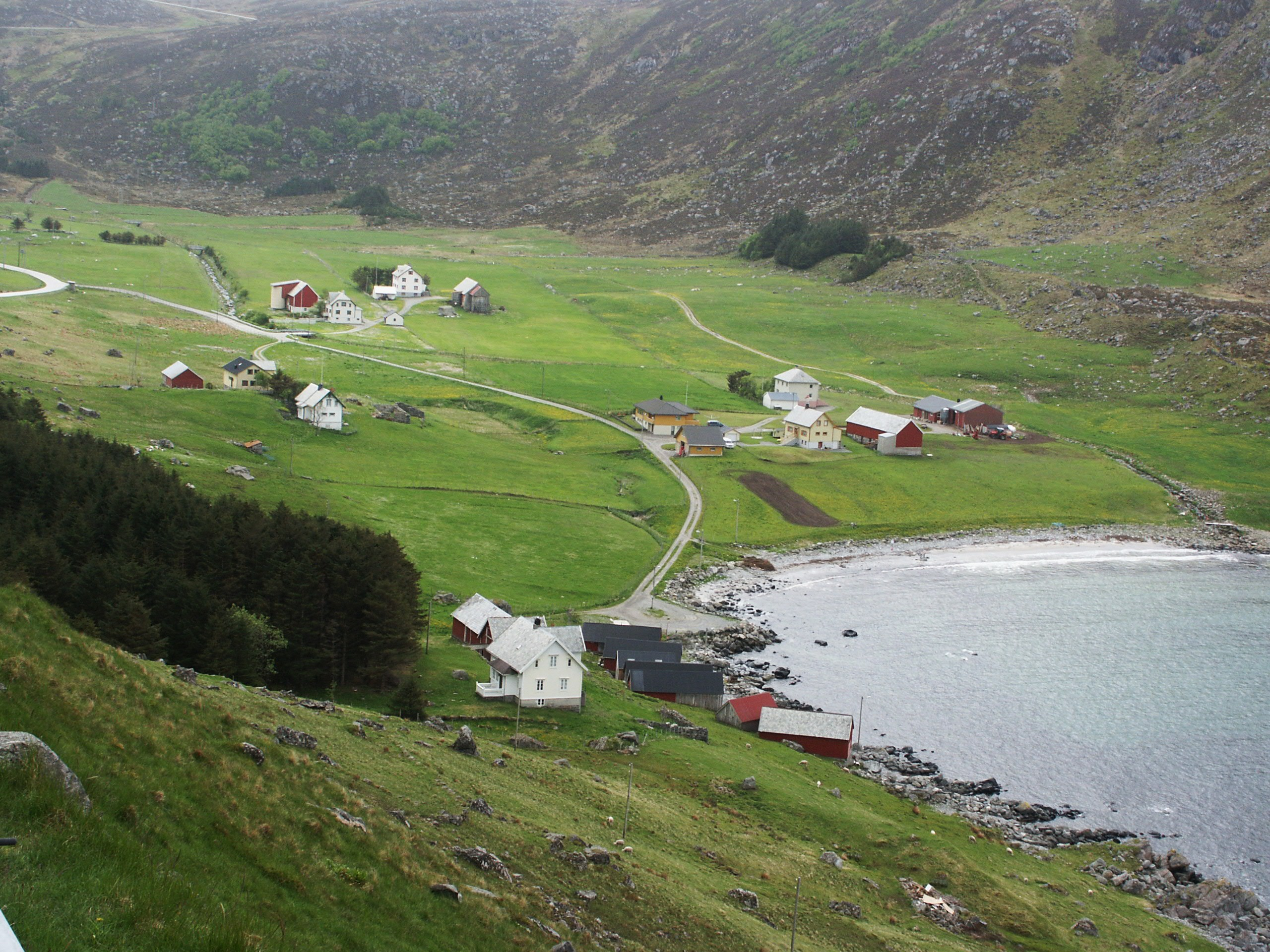 Årvik, Stadtlandet